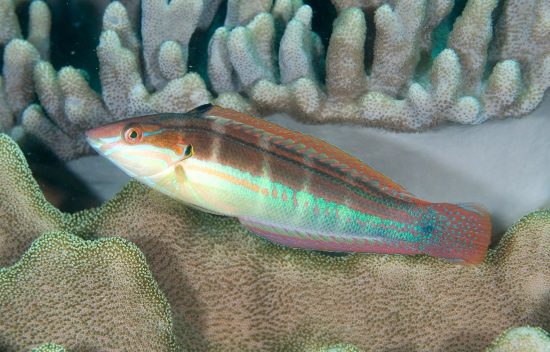 Coris caudimacula (hembra) en isla North Murion, Parque Marino de Ningaloo, Australia